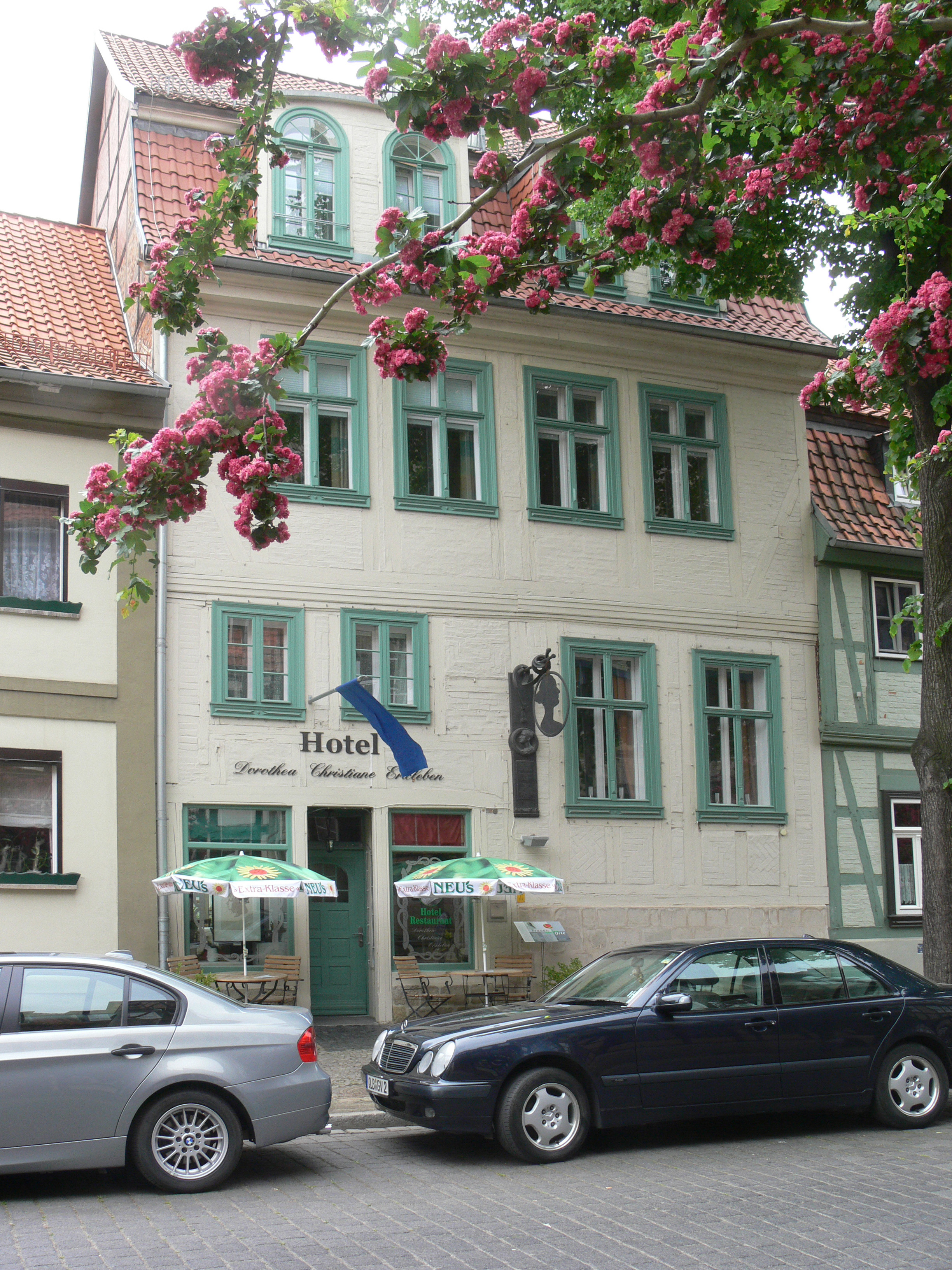 Haus Steinweg 51Quedlinburg. Hier lebte Dorothea Christiana Erxleben (1715-1762), die als erste Frau am 1. Mai 1754 in Deutschland das Doktorexamen in Medizin ablegte.